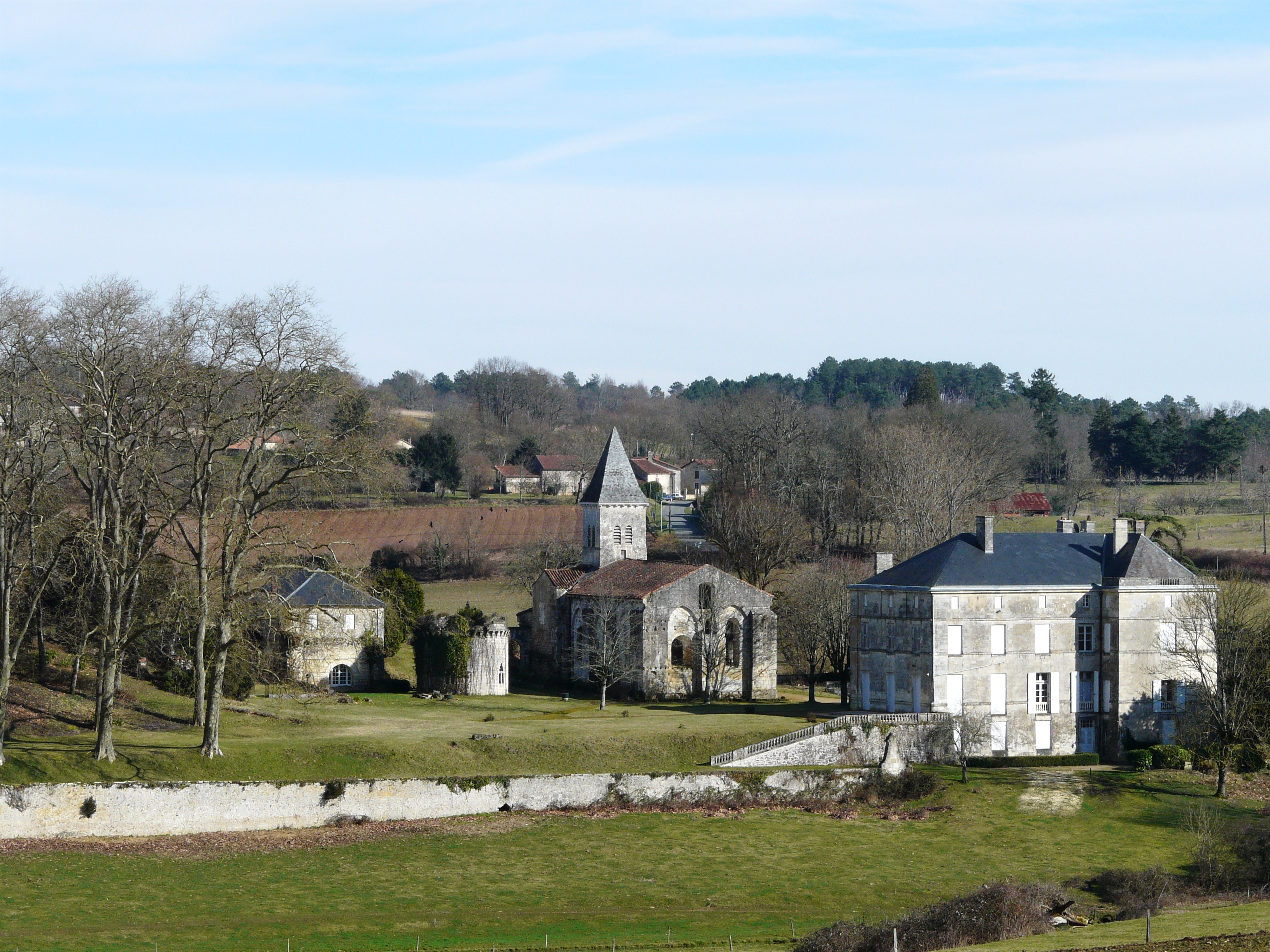 Le site de l'ancienne abbaye de Ligueux, Dordogne, France